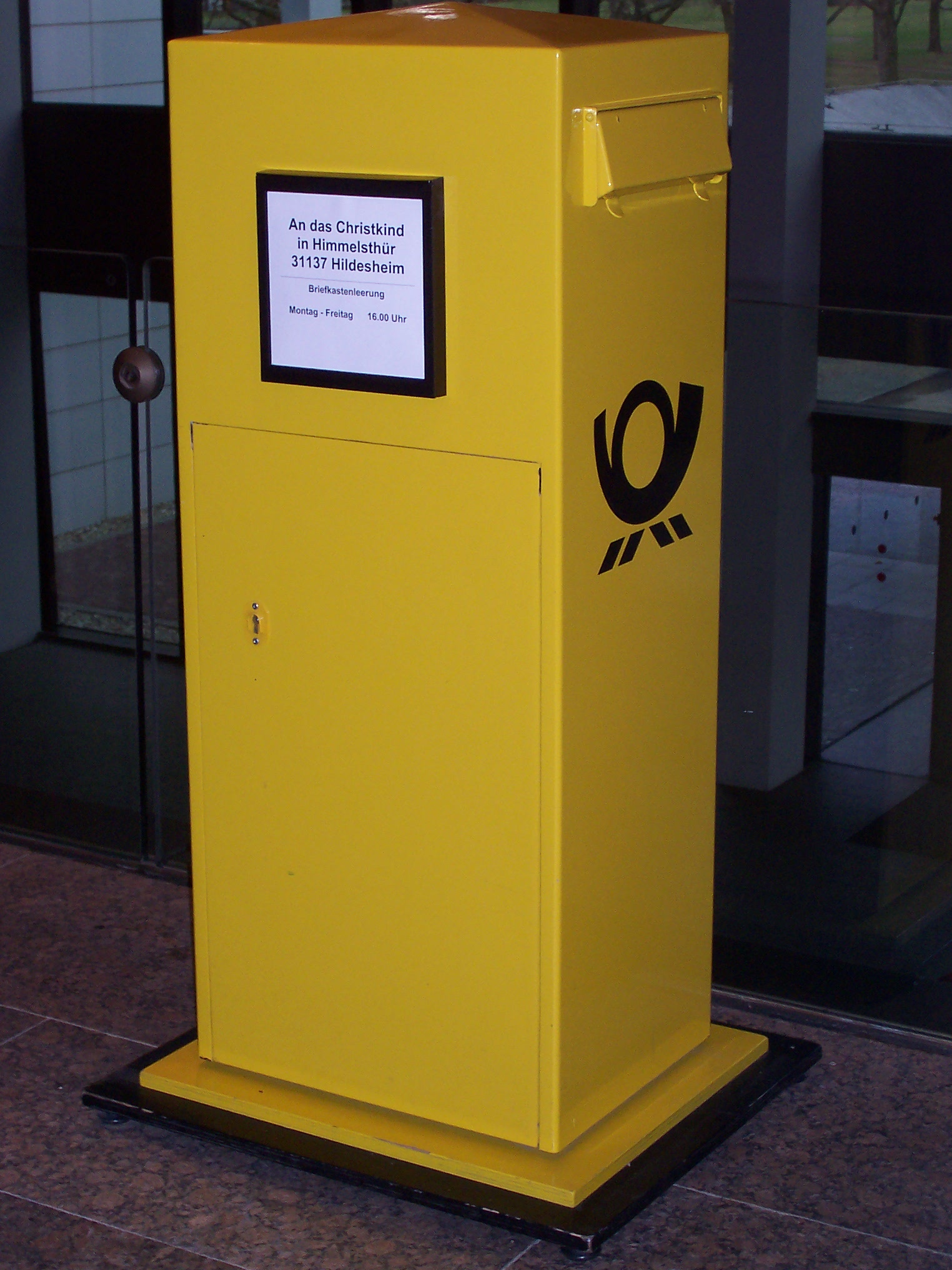 Briefkasten Post box an das Weihnachtspostamt